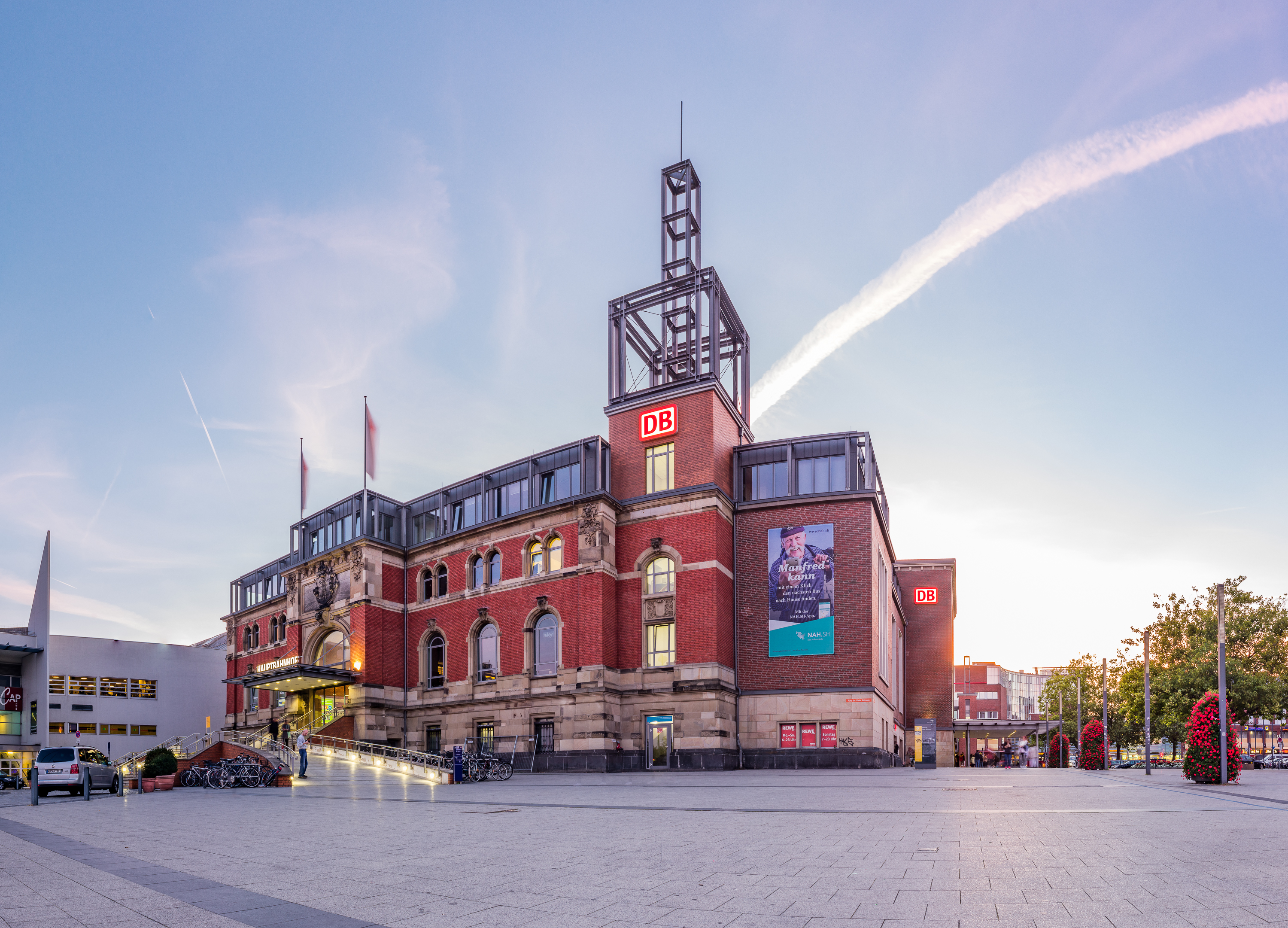 Der Hauptbahnhof Kiel.